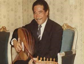 Compositor Egipcio Mohammed Al Mougui - Foto tomada en año 1980, publicada por el gobierno Egipcio - Sistema de información del estado Egipcio (SIS)